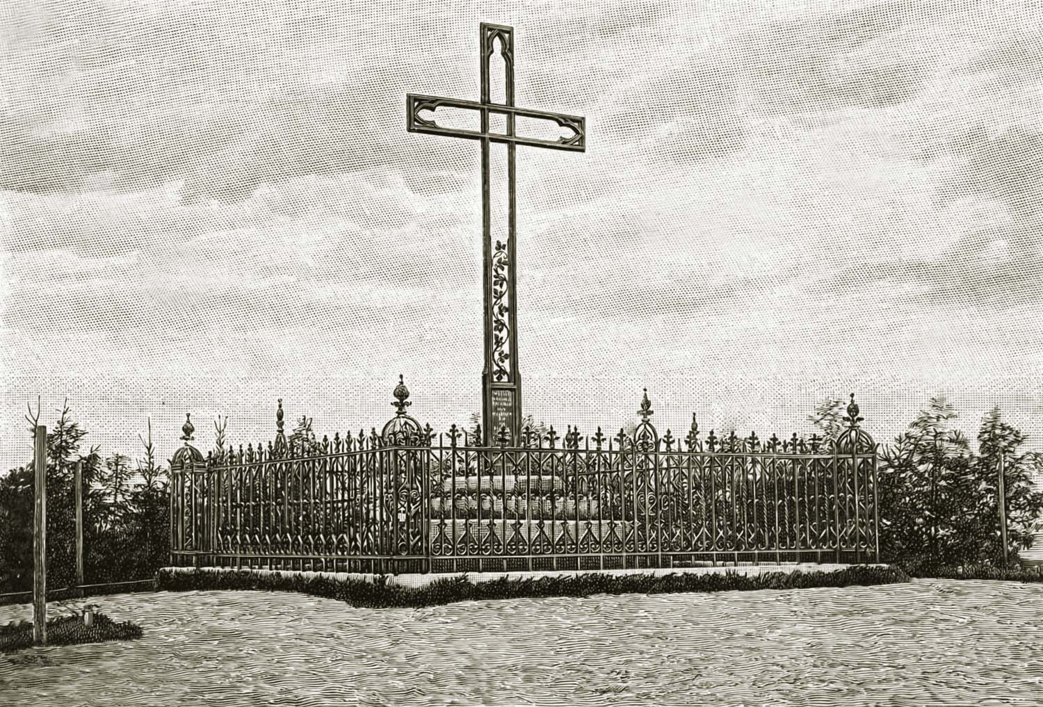 Fotografie des zweiten St. Adalbertkreuzes in Tenkitten, Samland, Ostpreußen